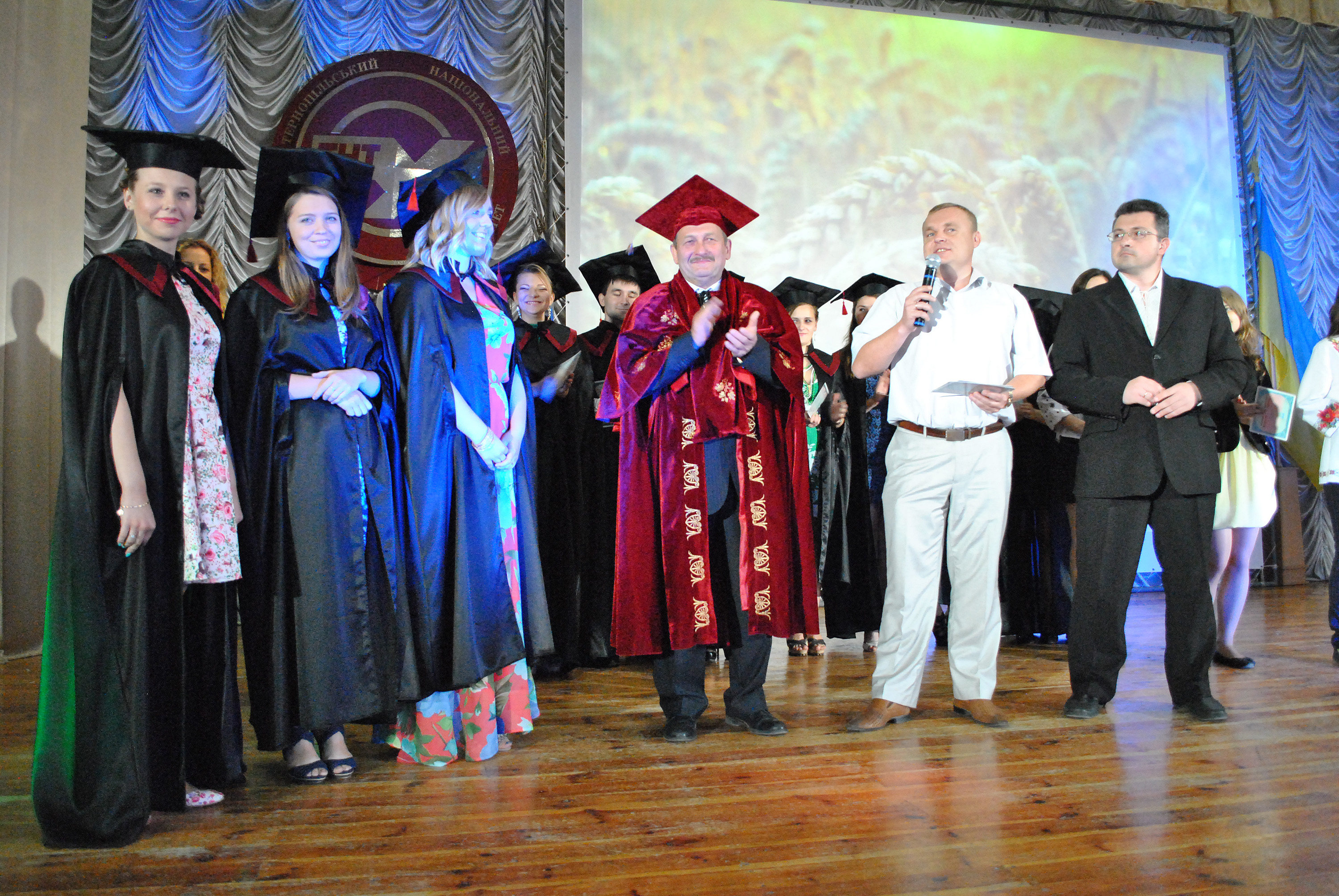 Тернопільський національний технічний університет імені Івана Пулюя. Дипломів випускникам 2014 року вручає ректор Петро Ясній.